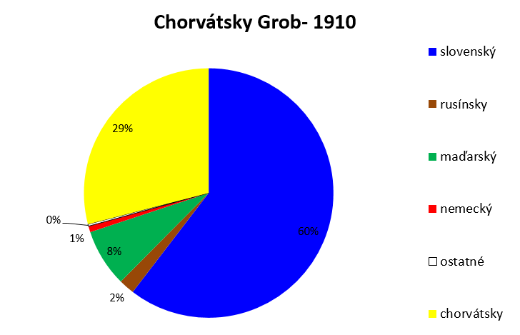 jazykové zloženie